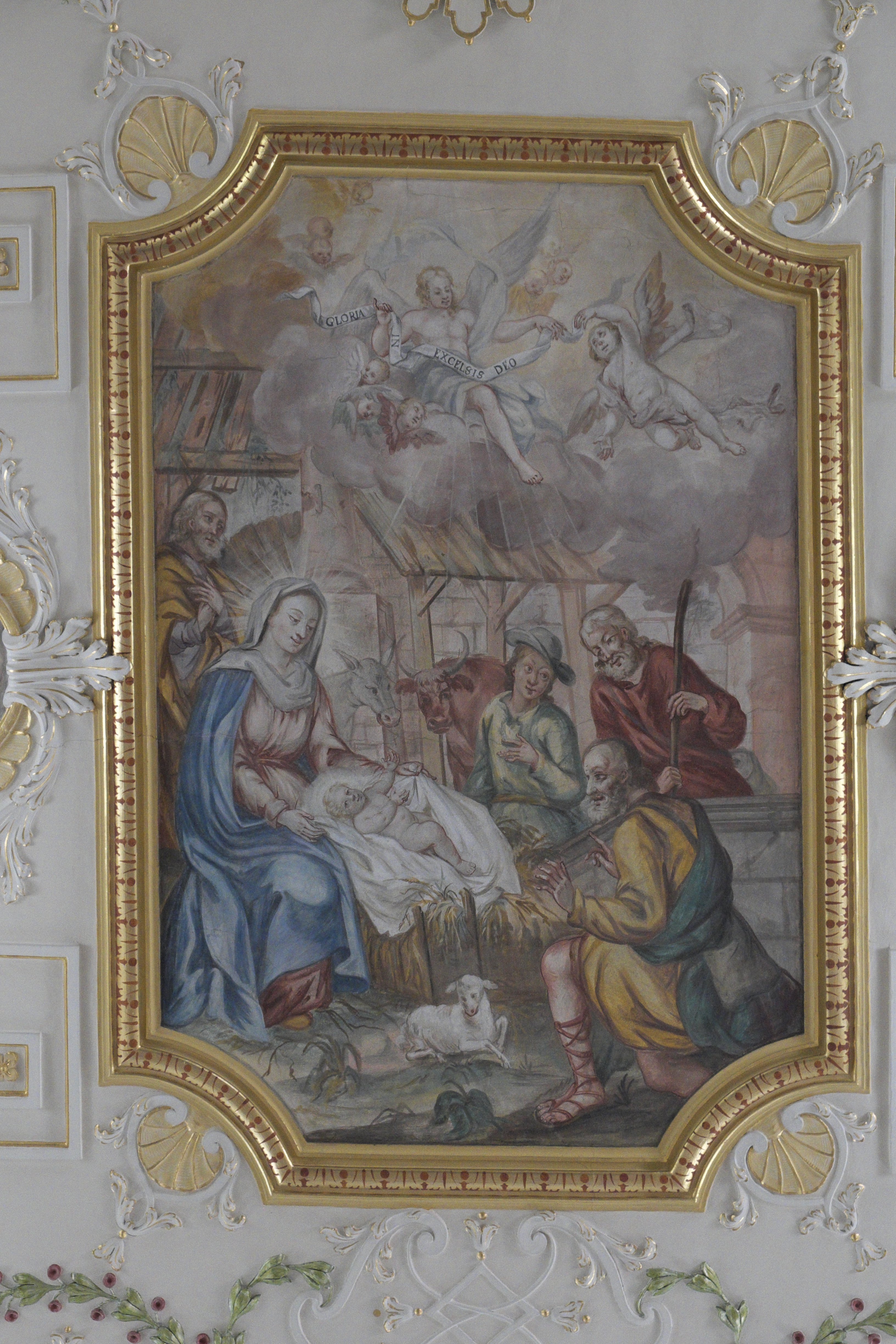 Katholische Pfarrkirche St. Benedikt in Odelzhausen im Landkreis Dachau (Bayern/Deutschland), Deckenmalerei und Stuck im Langhaus; Darstellung: Anbetung der Hirten